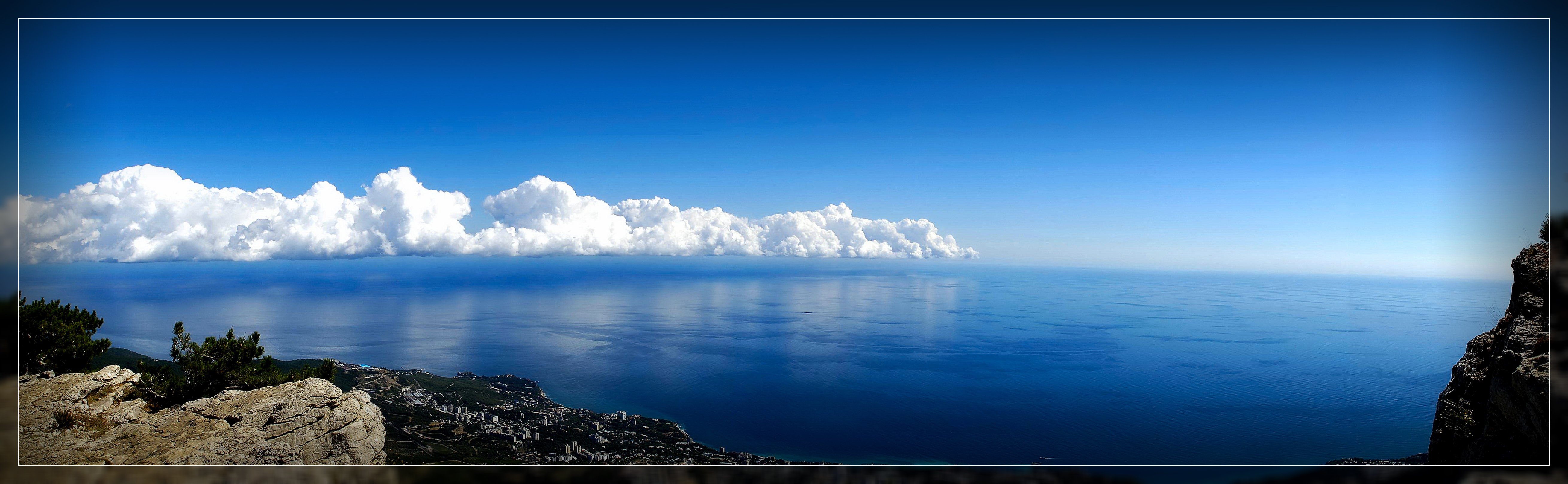 Рано утром(7 часов)оказался на верху и сделал этот панорамный кадр.Облака были ниже